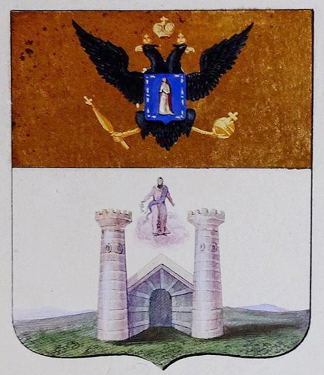 Беларуская (тарашкевіца): Барысаў (Barysaŭ). Расейскі герб места